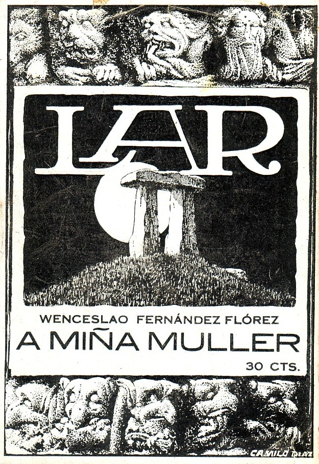 01 A miña muller. Wenceslao Fernández Flórez. Lar. 1924.jpg